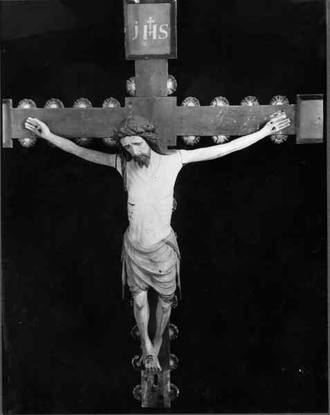 Triumfkrucifix av trä, 1400-talet. Kategori: (05) KrucifixTriumfkrucifix av trä, 1400-talet.